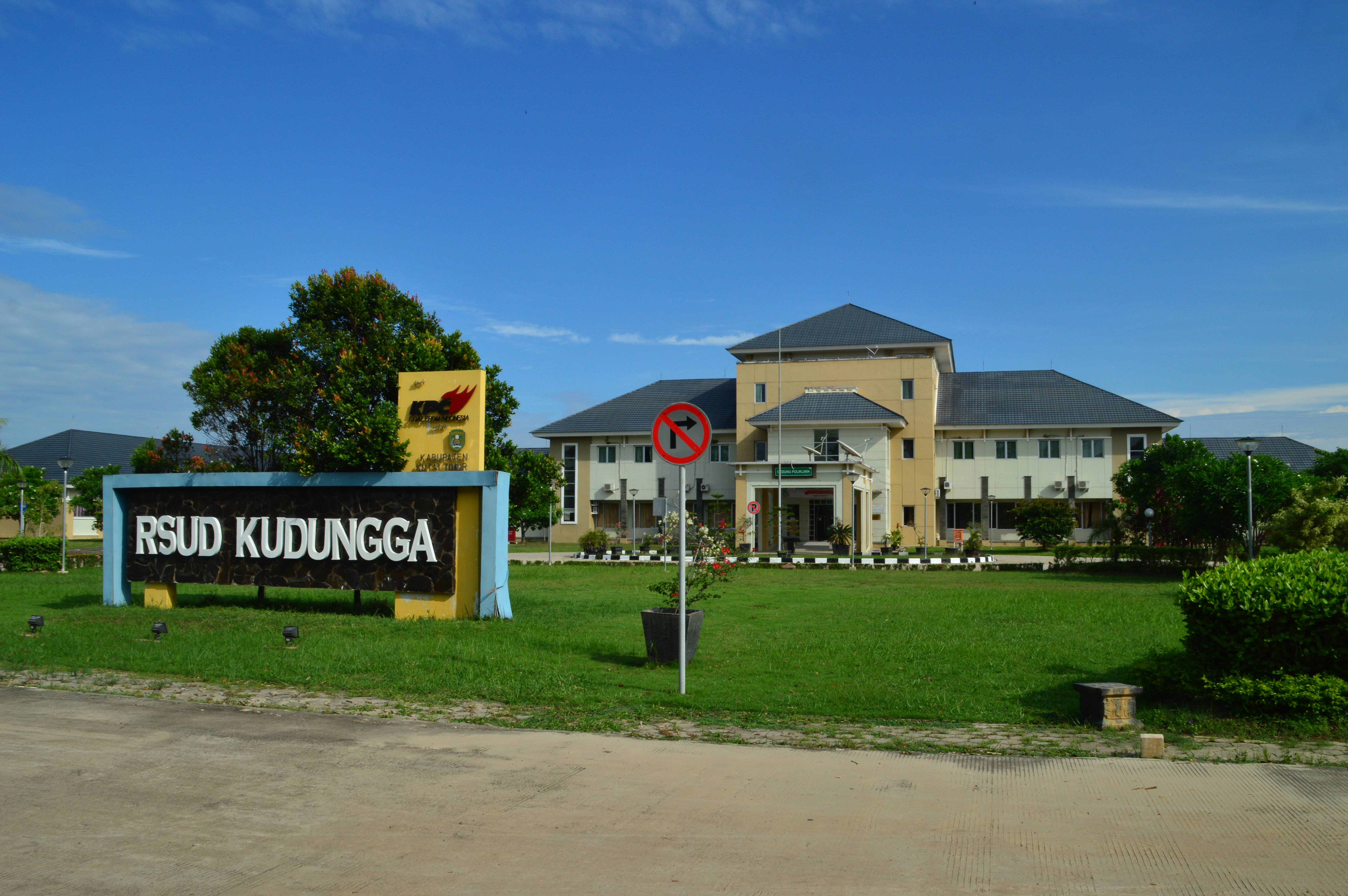 RSUD Kudungga, rumah sakit umum milik pemerintah di Kabupaten Kutai Timur.